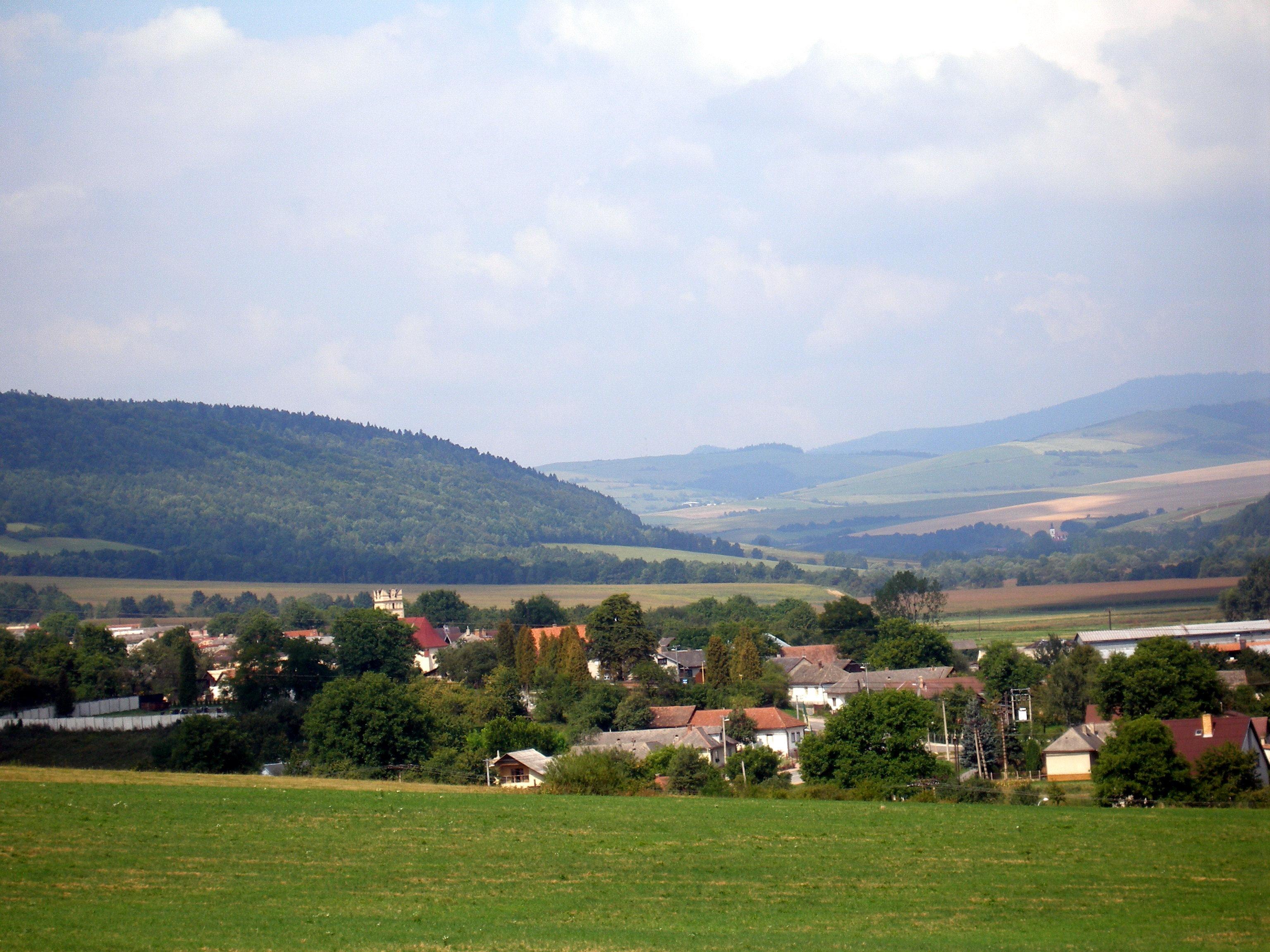 Šarišská obec Chmiňany pohľad od Ondrášoviec